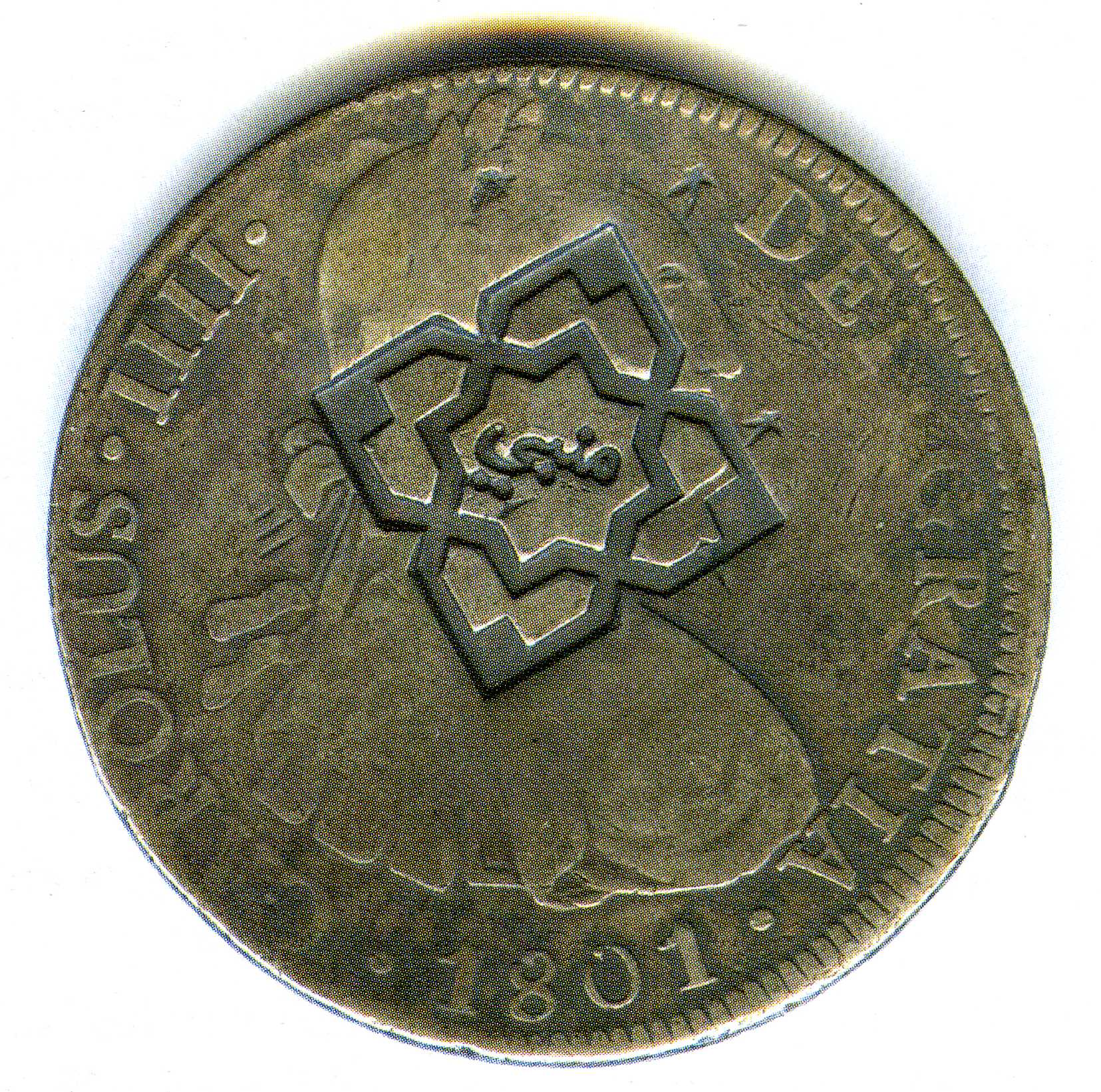 Moneda española utiliza en Bombay por la Compañía Británica de las indias.